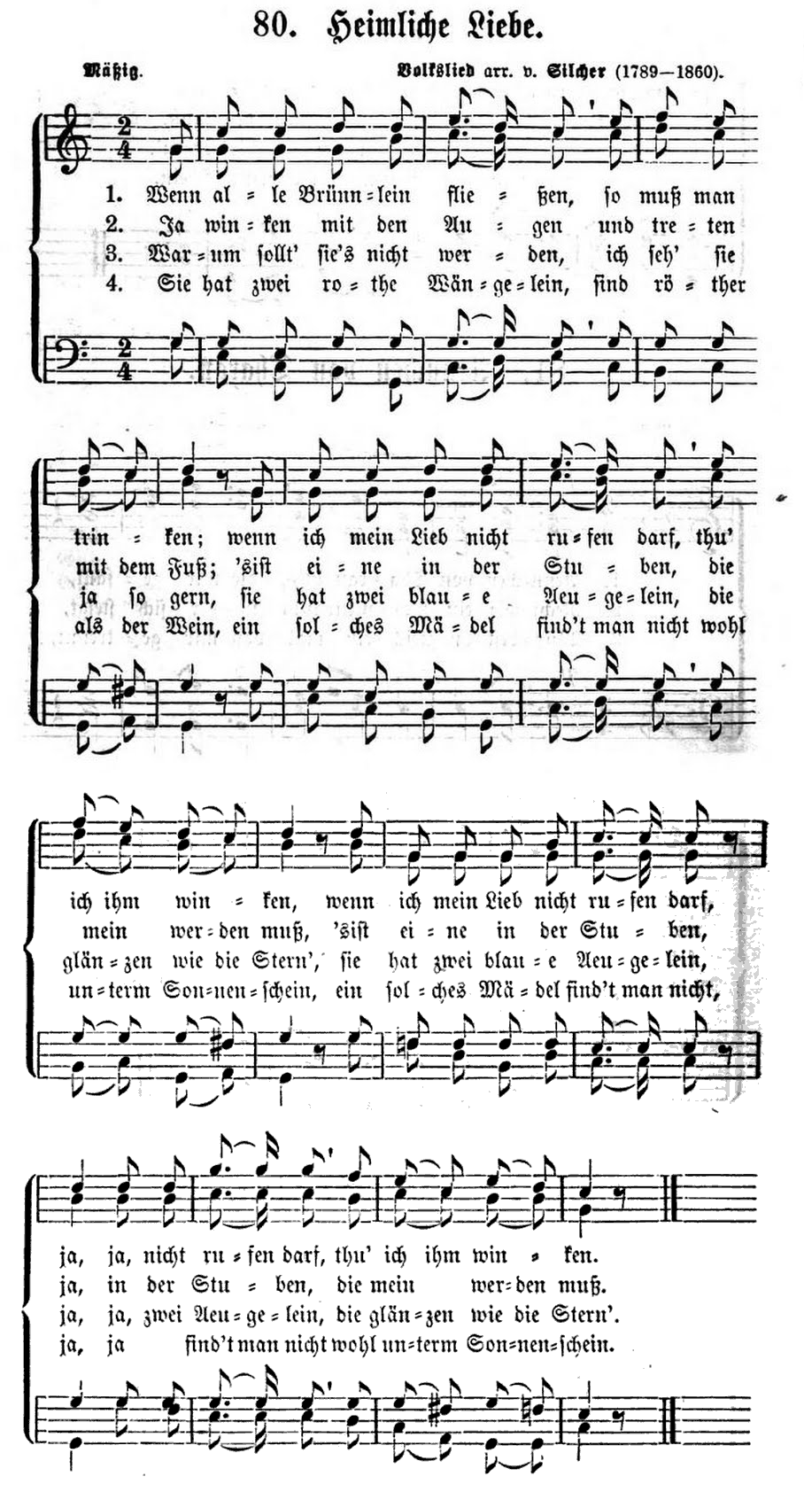 Heimliche Liebe (Wenn alle Brünnlein fließen), Text (trad.), Melodie (trad.) und Satz von Friedrich Silcher